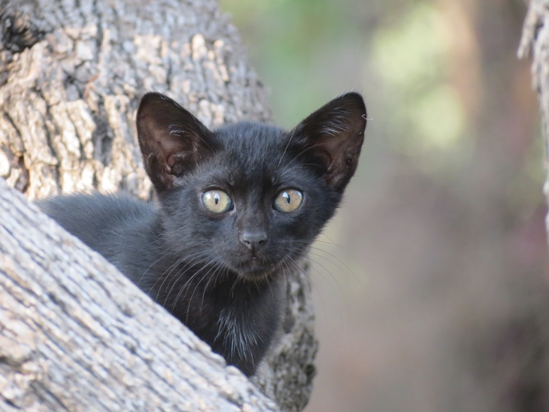 חוסמסה הוא מבנה בסגנון הבינלאומי השוכן בליבם של חורש וגן על גבעה קטנה בעיר חולון. המצודה קרויה ככל הנראה על-שמה של אדמת חוסמס, שמה הערבי של שכבת קרקע באדמות מישור החוף. המבנה בן שתי הקומות בצורת מצודה שלה מגדל. המבנה שימש כבית באר ומהקמתו ועד שנת 1948 שימש כמקום לאתר אימונים של ההגנה.